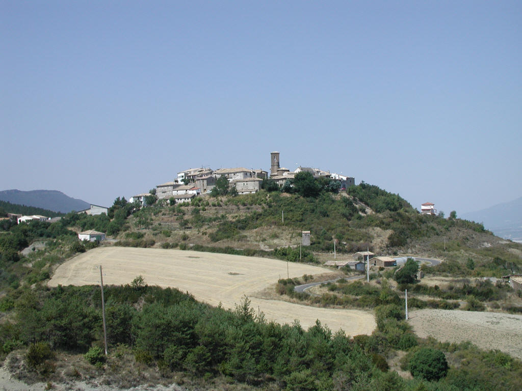 Vista este del municipio de Artieda.